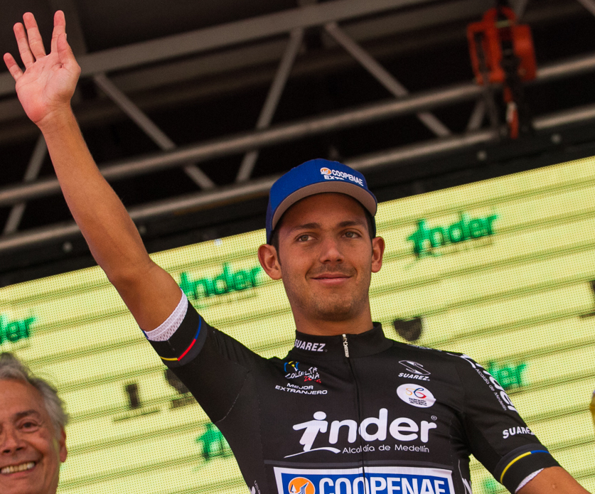 Eta2. Vuelta a Colombia 2015 - Lunes 3 de agosto de 2015. Bogotá - Paipa (174Kms)